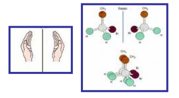 Isomero optikoak